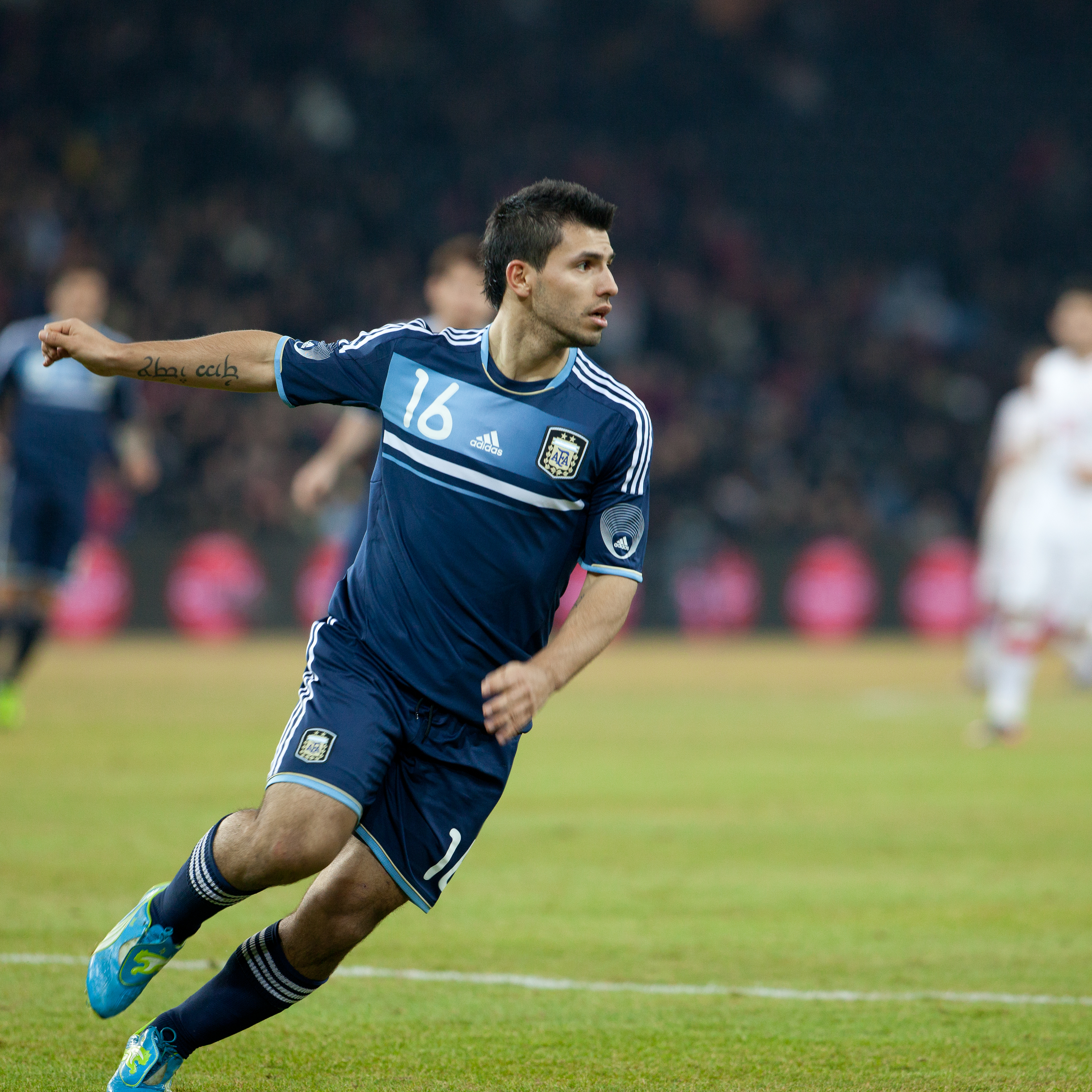 Sergio Agüero